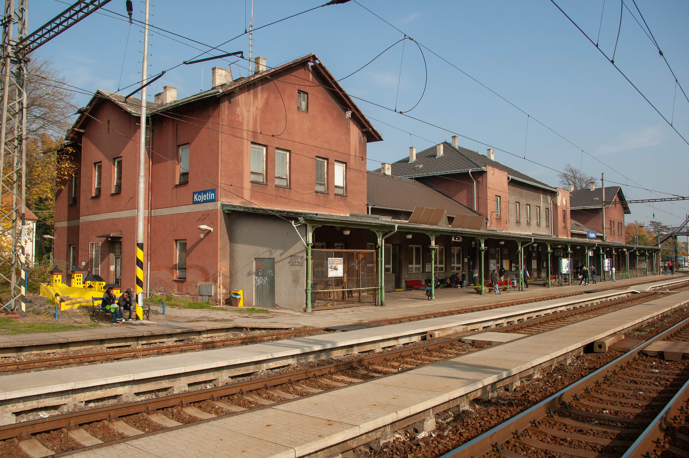 Nádražní budova v Kojetíně